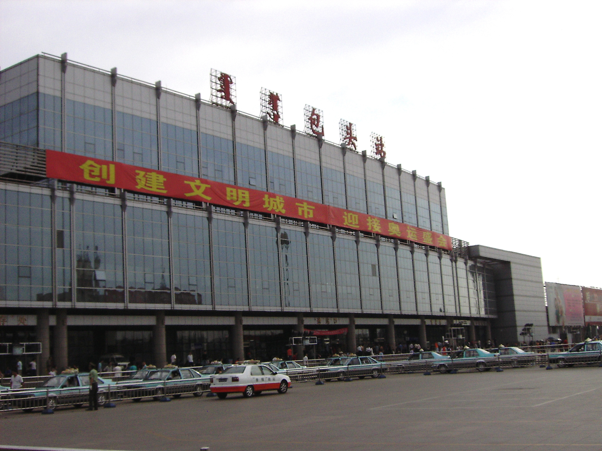 包头火车站